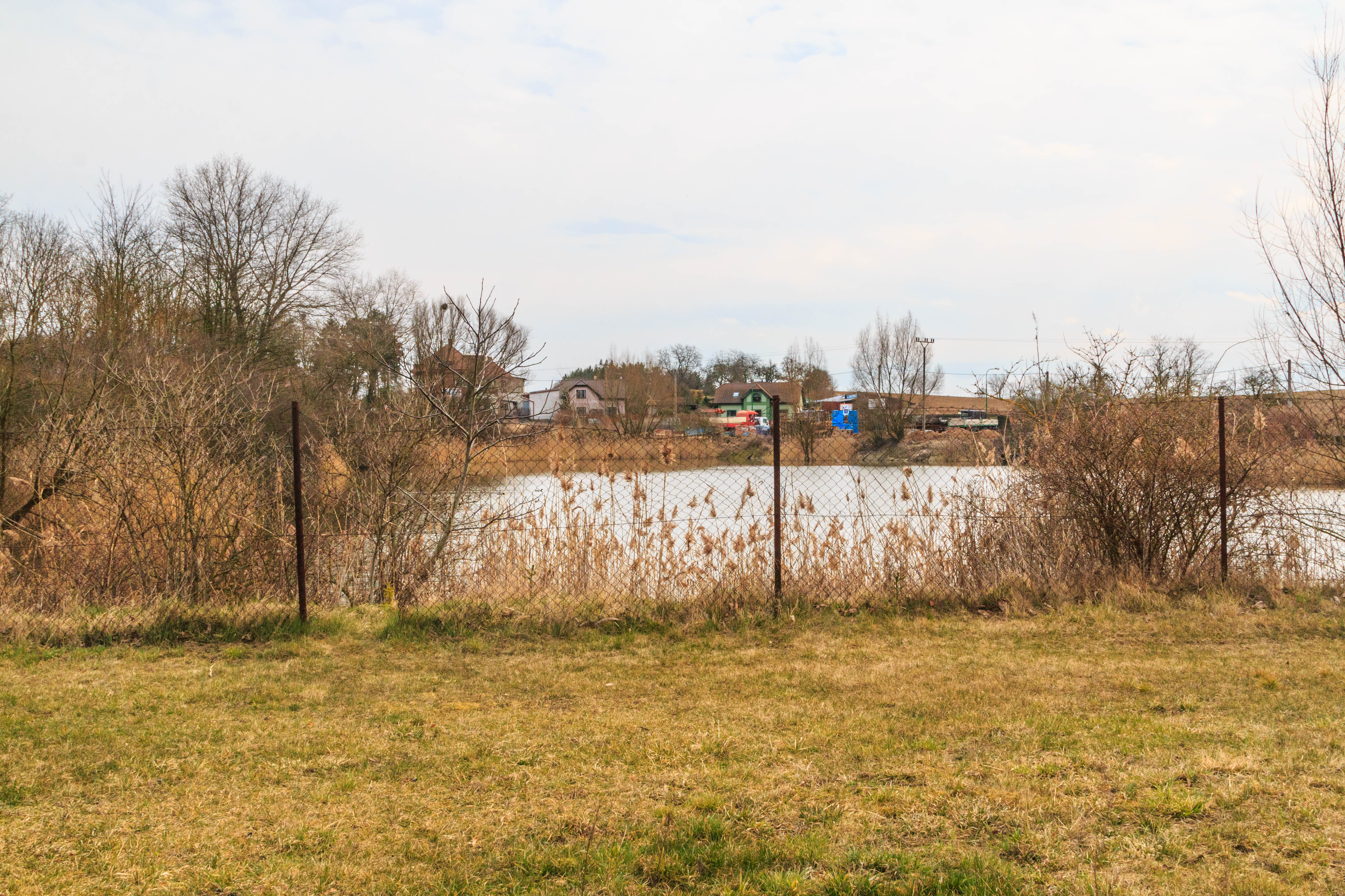 Písník pod Skalkou u Chlumce nad Cidlinou Project: Vodstvo.